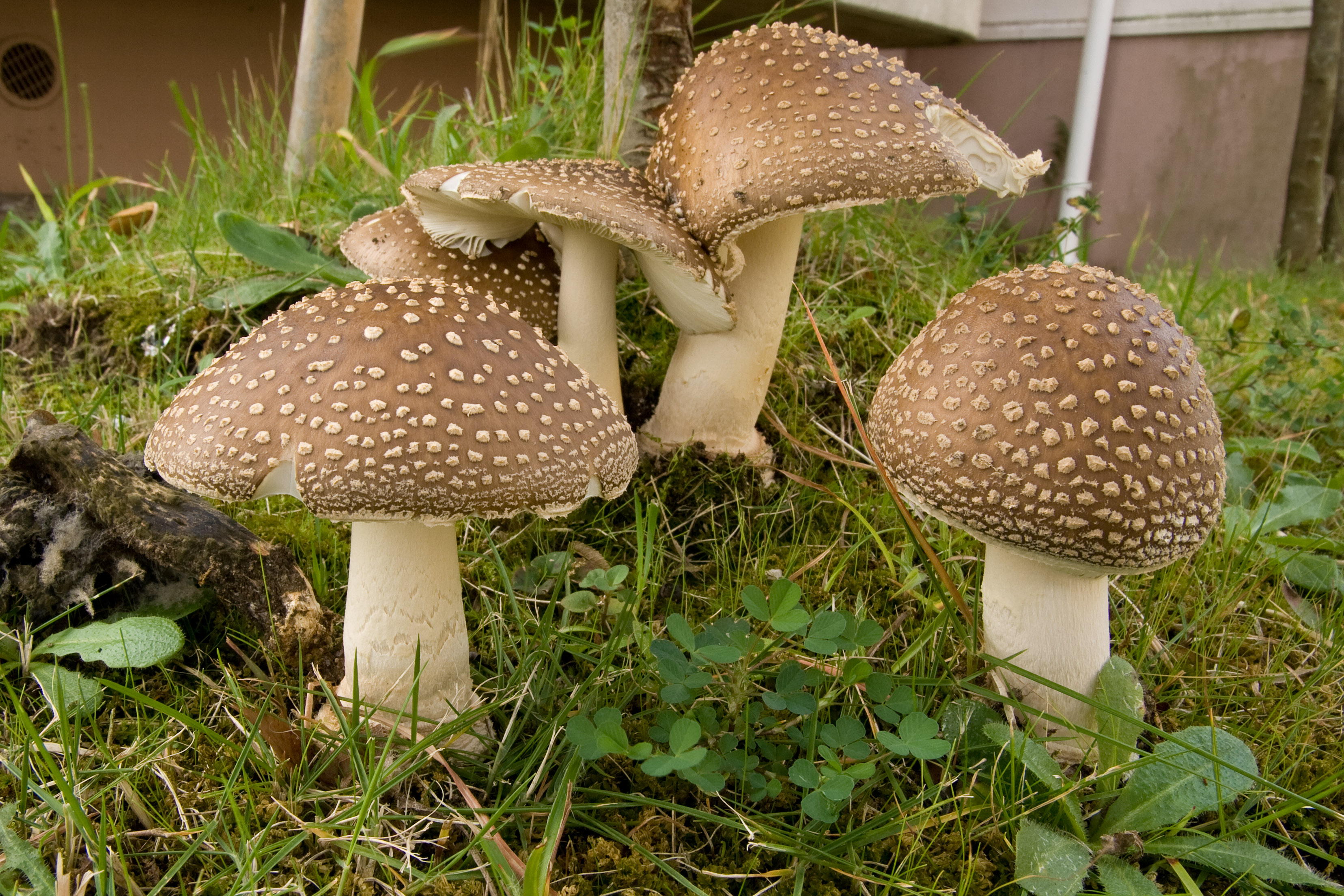 テングタケ (学名：Amanita pantherina)